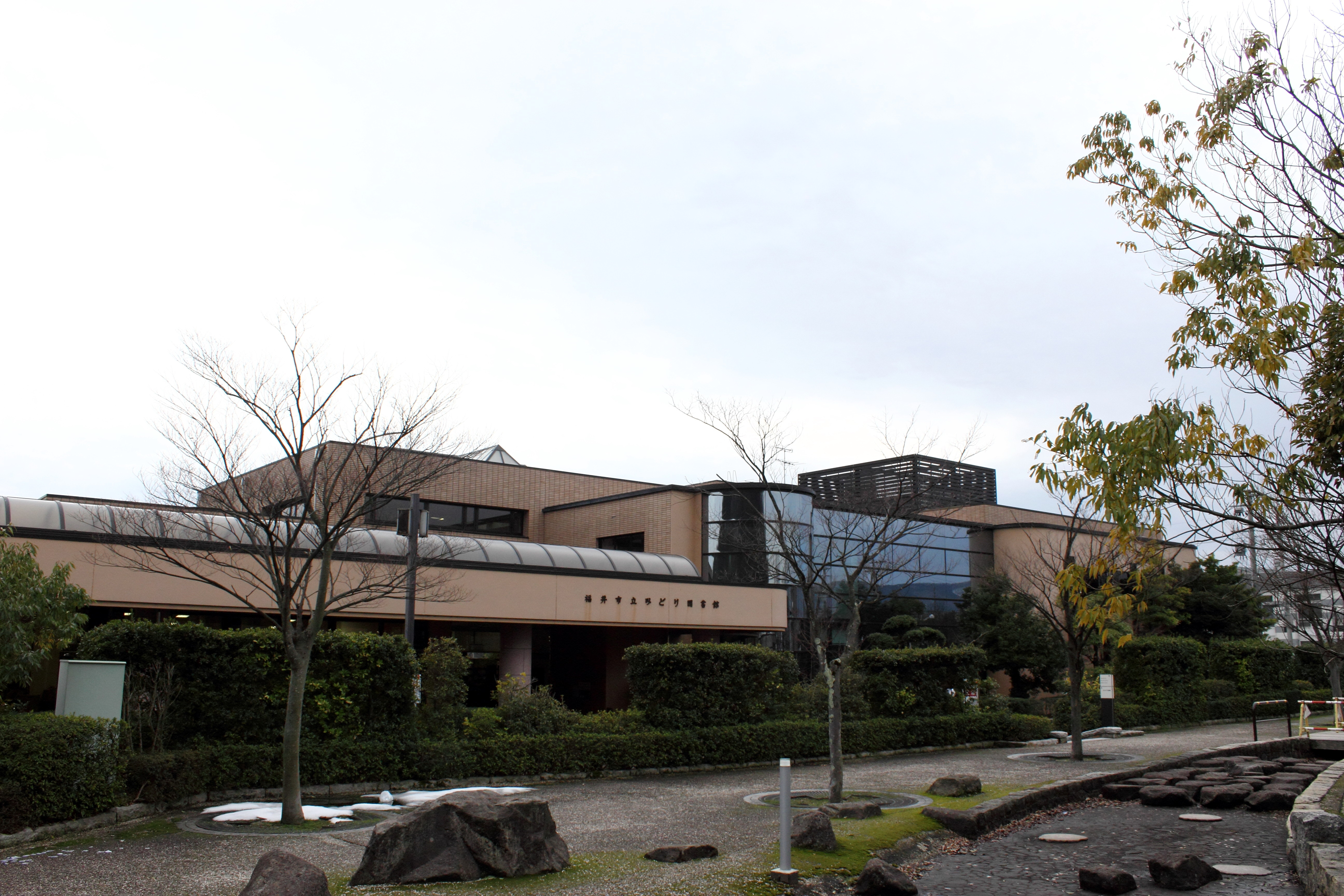 福井市立みどり図書館